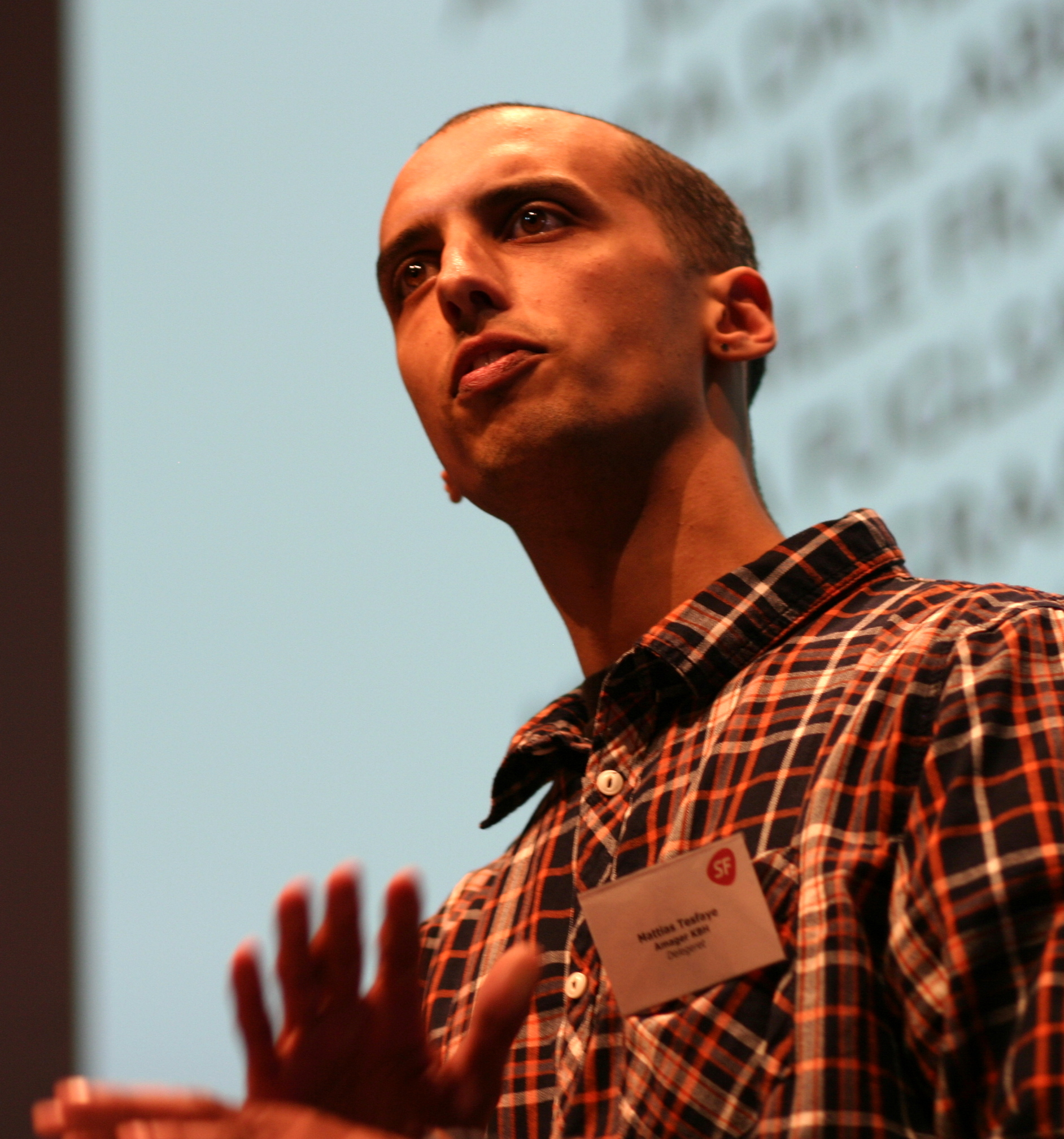 Mattias Tesfaye taler ved SF's Landsmøde 2012 i Kolding.